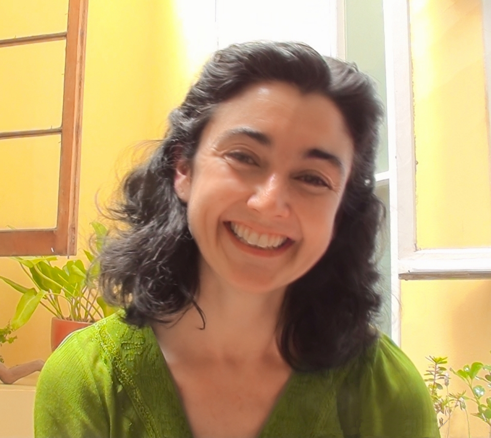 Captura del Documental LOCOS DE REMATE dirigido por Italo Gianti sobre Teleseries Chilenas de los Noventas